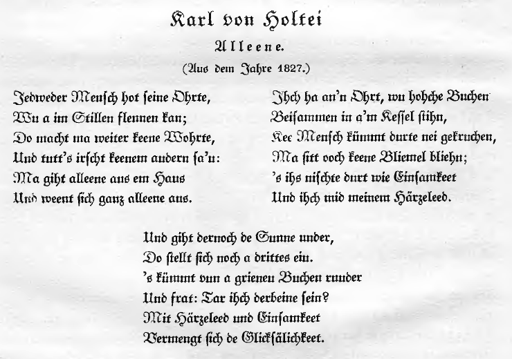 "Alleene" (Gedicht in schlesischer Mundart)